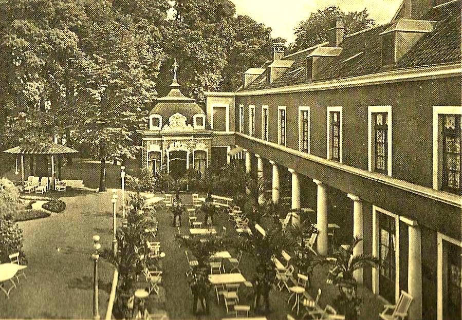 Gartenhaus Nuellens im Garten des Hotel Nuellens in Aachen zwischen 1840 und 1927